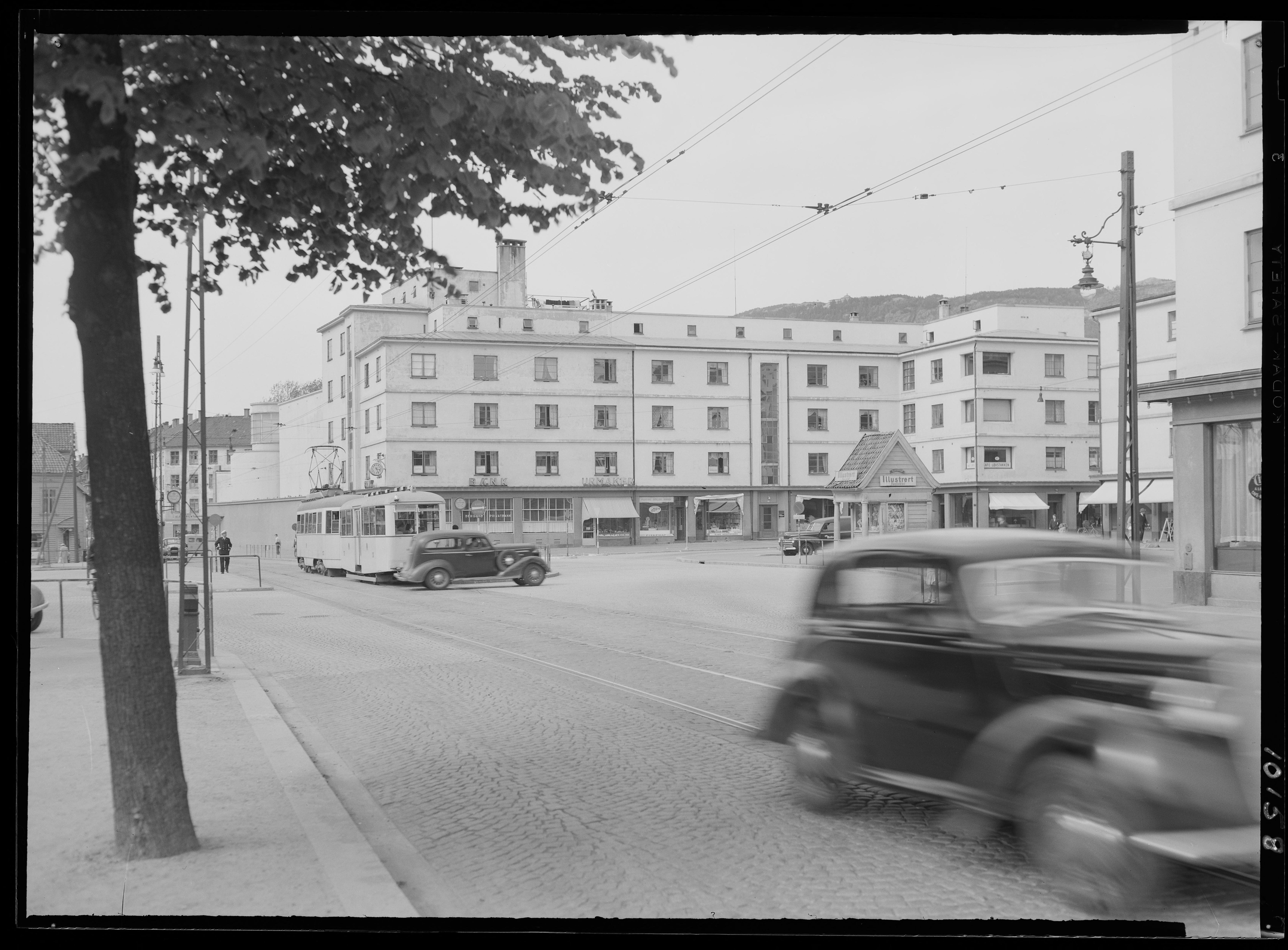 Bildet er hentet fra Nasjonalbibliotekets bildesamling. Anmerkninger til bildet var: Fotograf : ukjent Bergen,Danmarksplass, Bergen, Hordaland